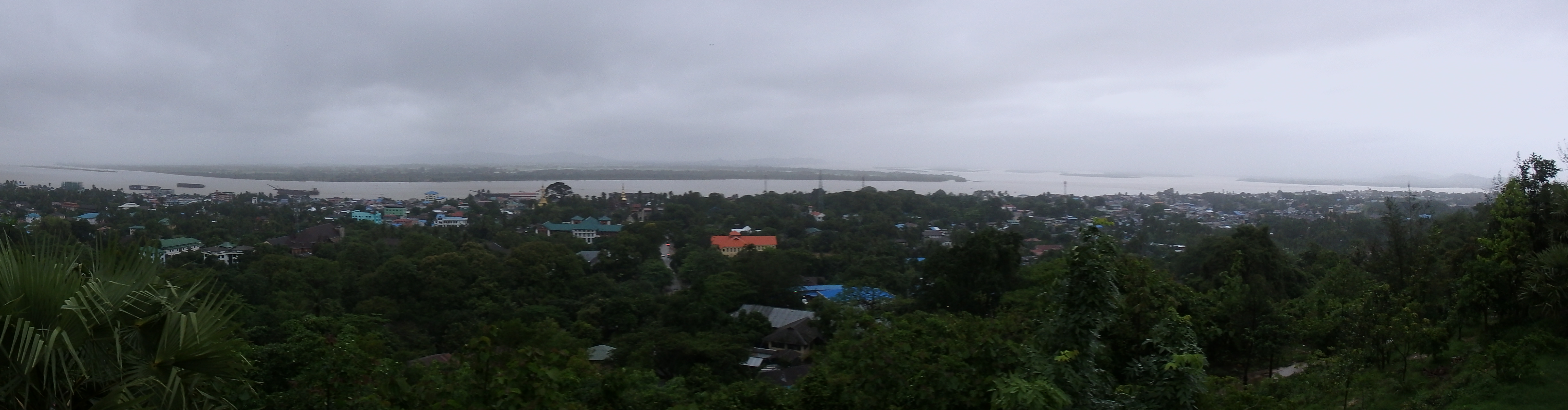 Mawlamyine MMR011001701, Myanmar (Burma)